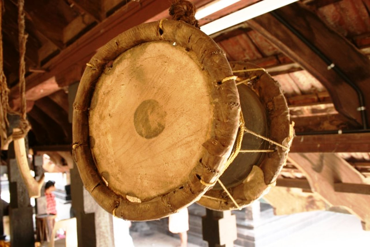 കടുംതുടി (വാഴപ്പള്ളി മഹാക്ഷേത്രം), ചങ്ങനാശ്ശേരി